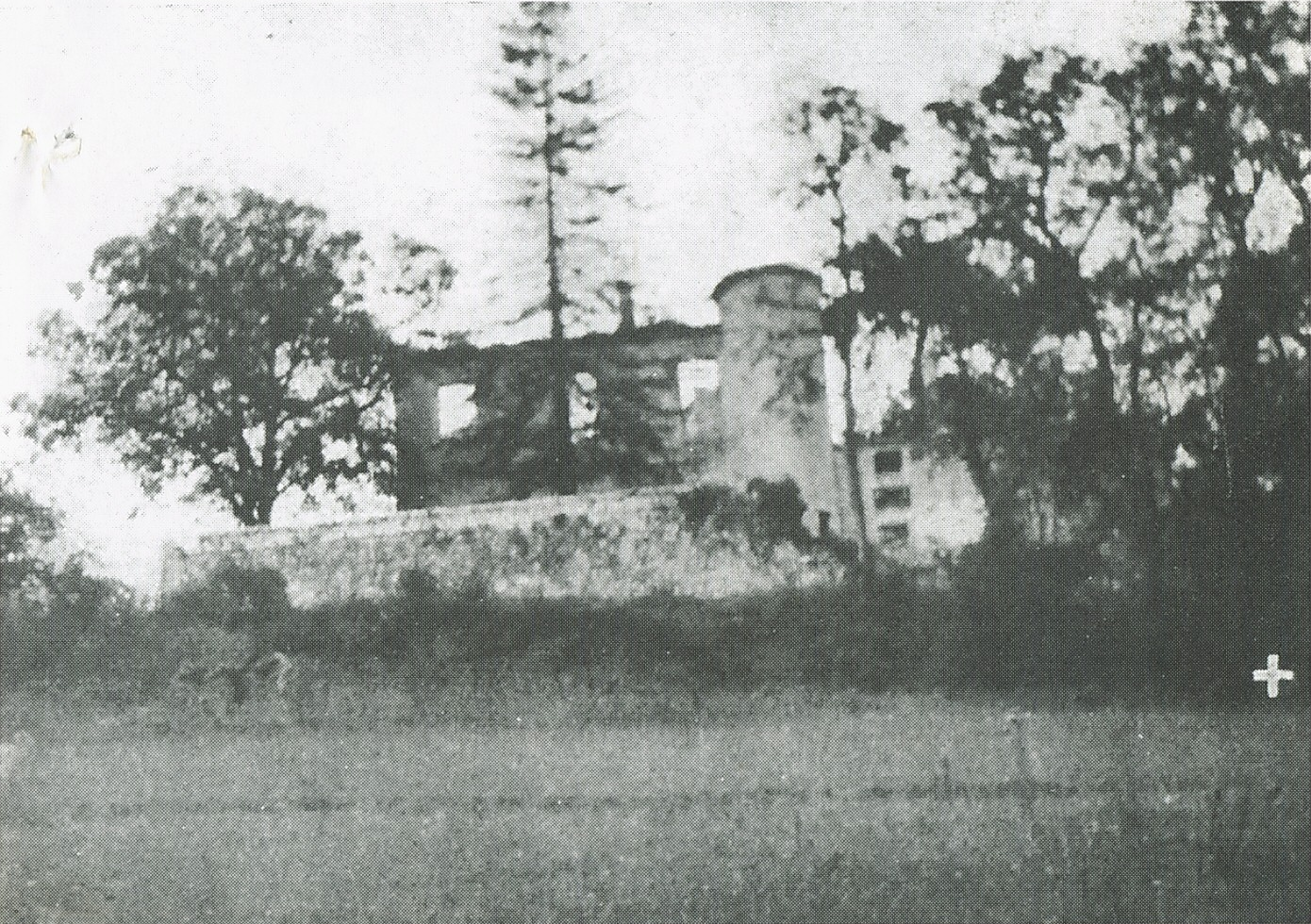 Château de Laclotte en 1946 après sa destruction par incendie le 7 juin 1944. A droite, la croix désigne l'emplacement où, le 7 juin 1944, furent fusillés un résistant et quatre civils capturés. Château construit par Jean-Baptiste de Chaudordy dans les années 1820 sur la commune de Castelculier, France.